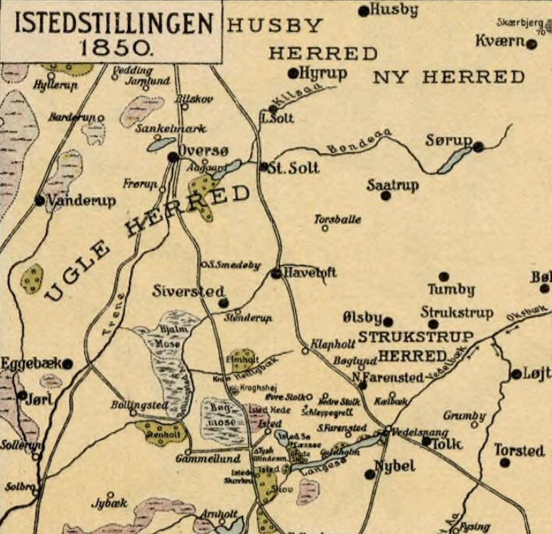 Istedstillingen 1849